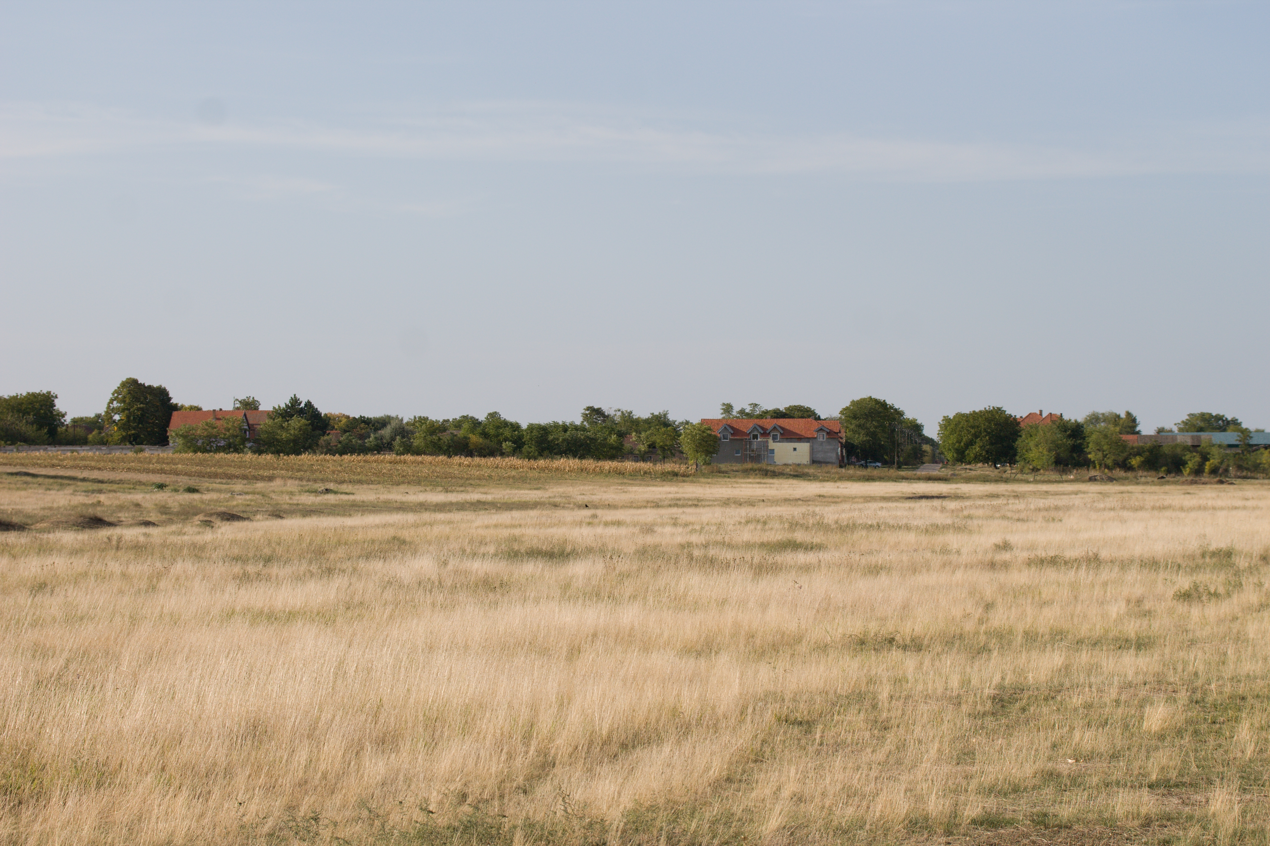 Slatinsko stanište u okolini Idvora.